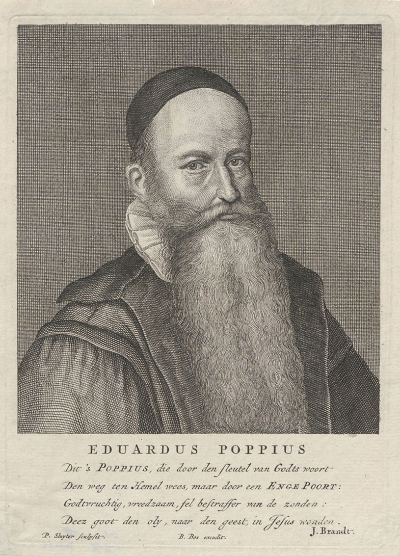 Portret van Eduardus Poppius (1576-1624)